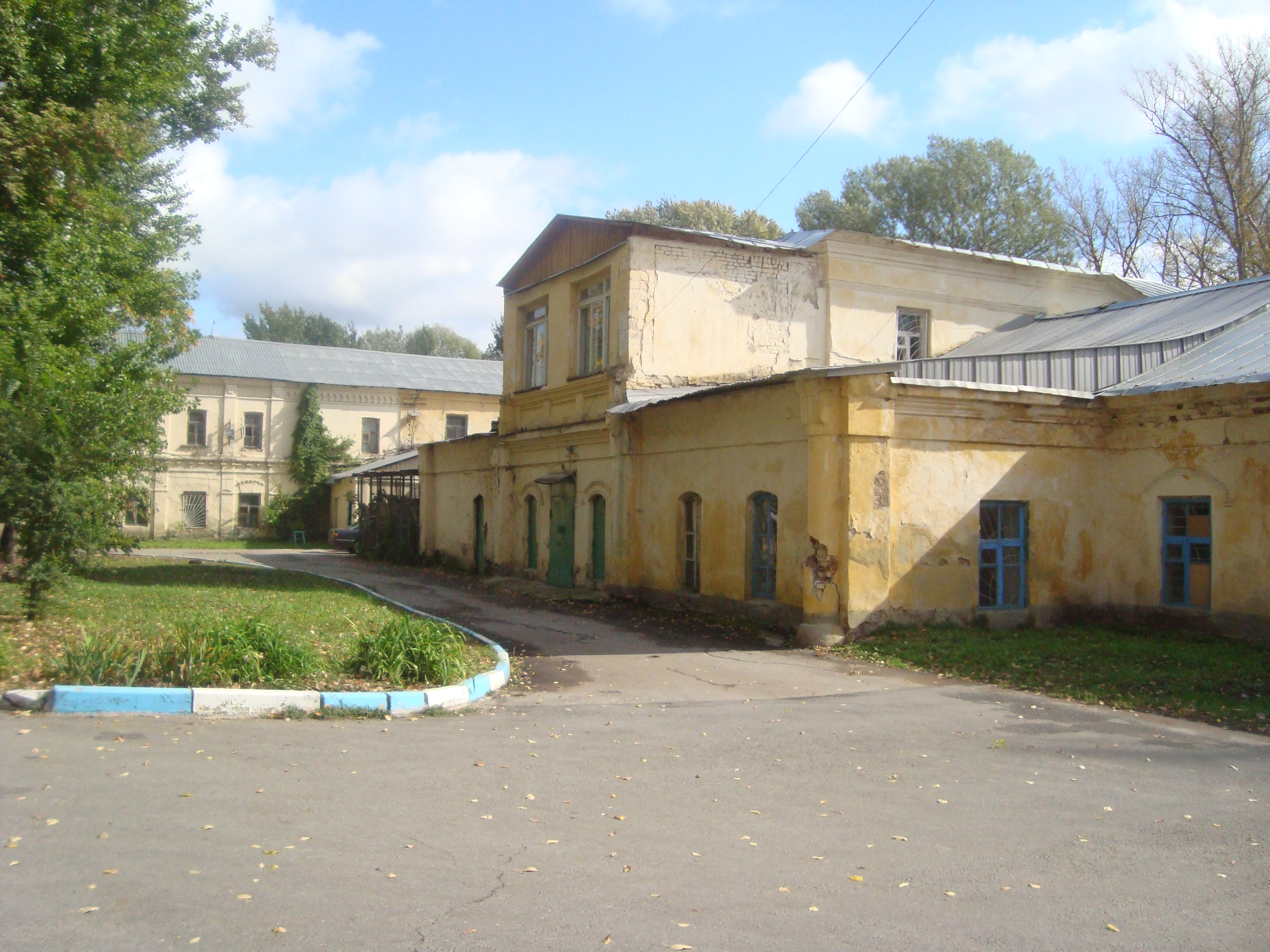 Липецк. Петровский проезд, 2